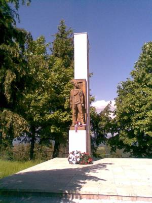 Pomnik obesenym a partizanom nad Budinou